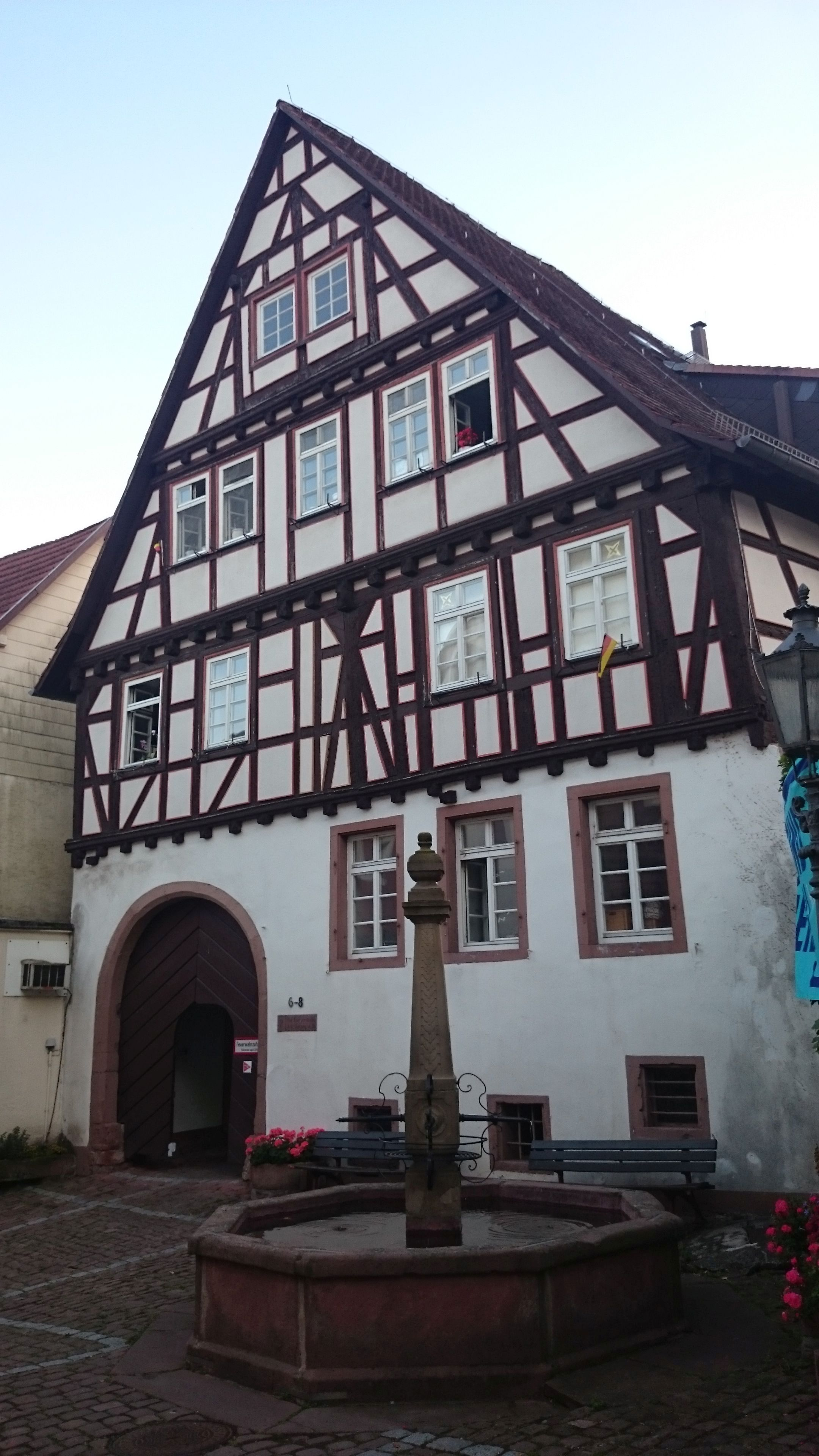 Neckarsteinach